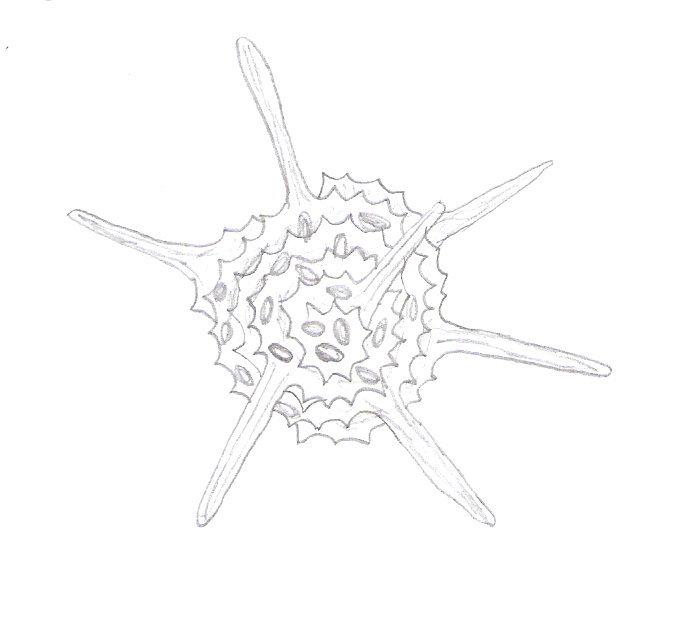 Een tekening van een straaldiertje.